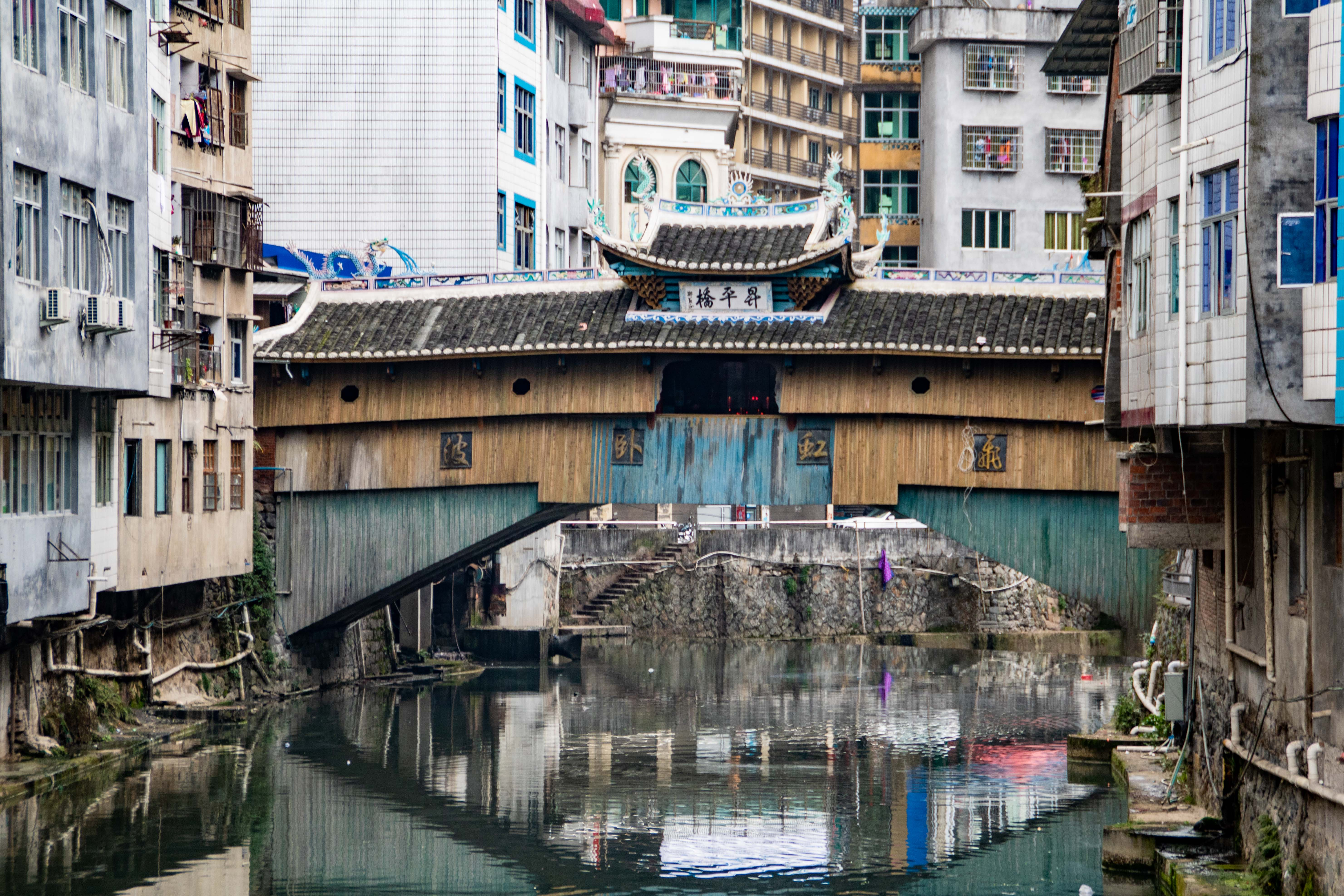 中文（中国大陆）: 寿宁县鳌阳镇升平桥